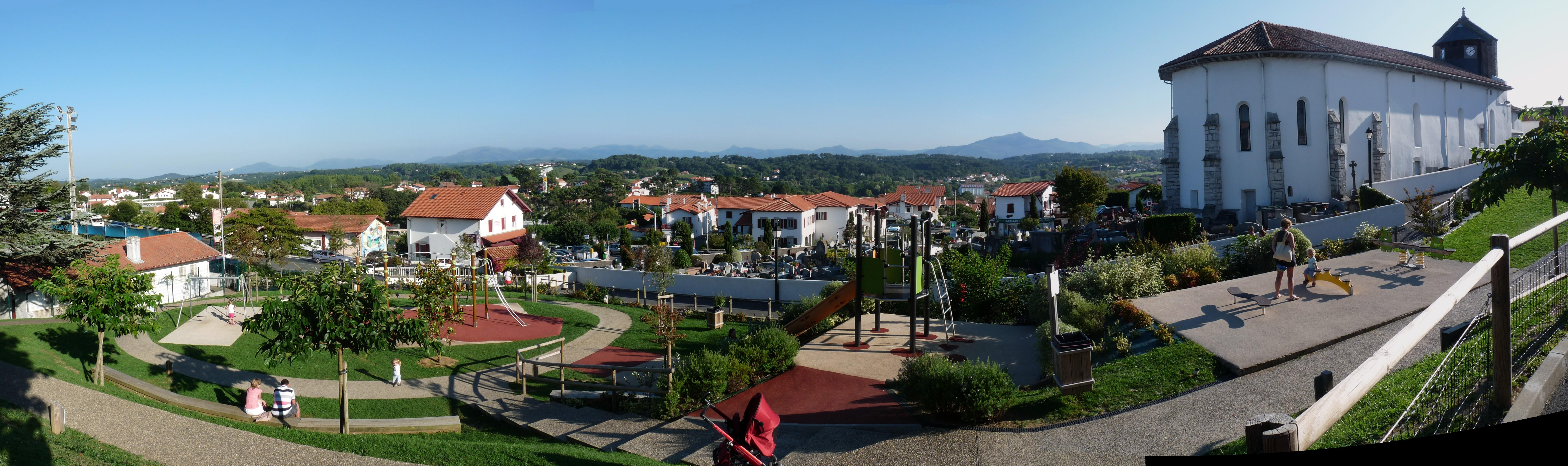 Aire de jeux pour enfants - Plazako Lilitegia à Bidart